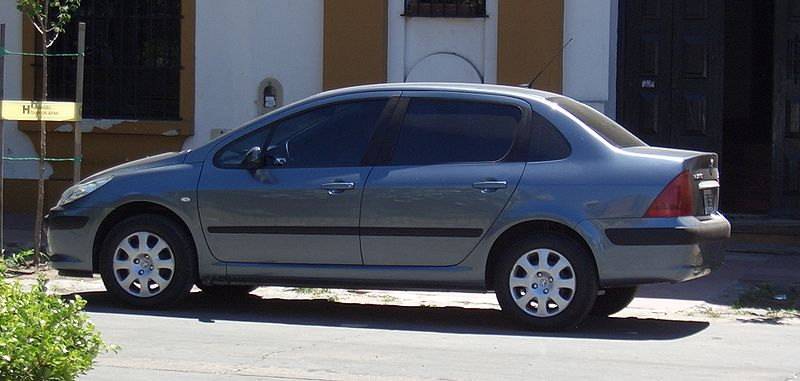 peugeot 307 sedan